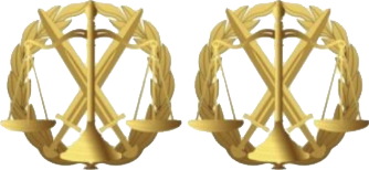 Емблема на комір, юридична служба